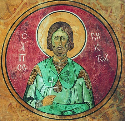 Мч. Виктор. Роспись ц. Панагии Аракос на Кипре. 1192 г.